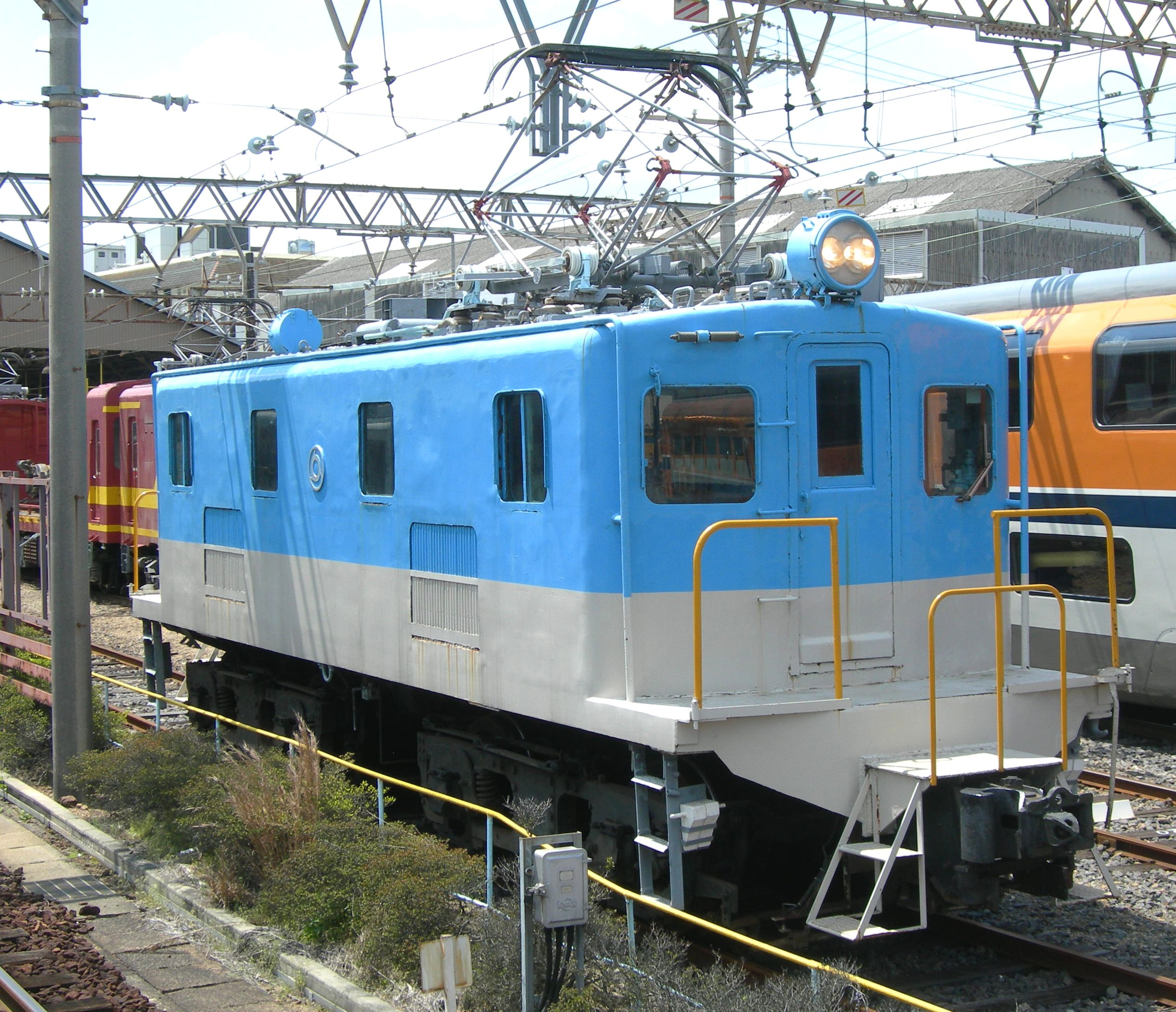 近鉄デ31形電気機関車32号機 近鉄塩浜検修車庫内入換機